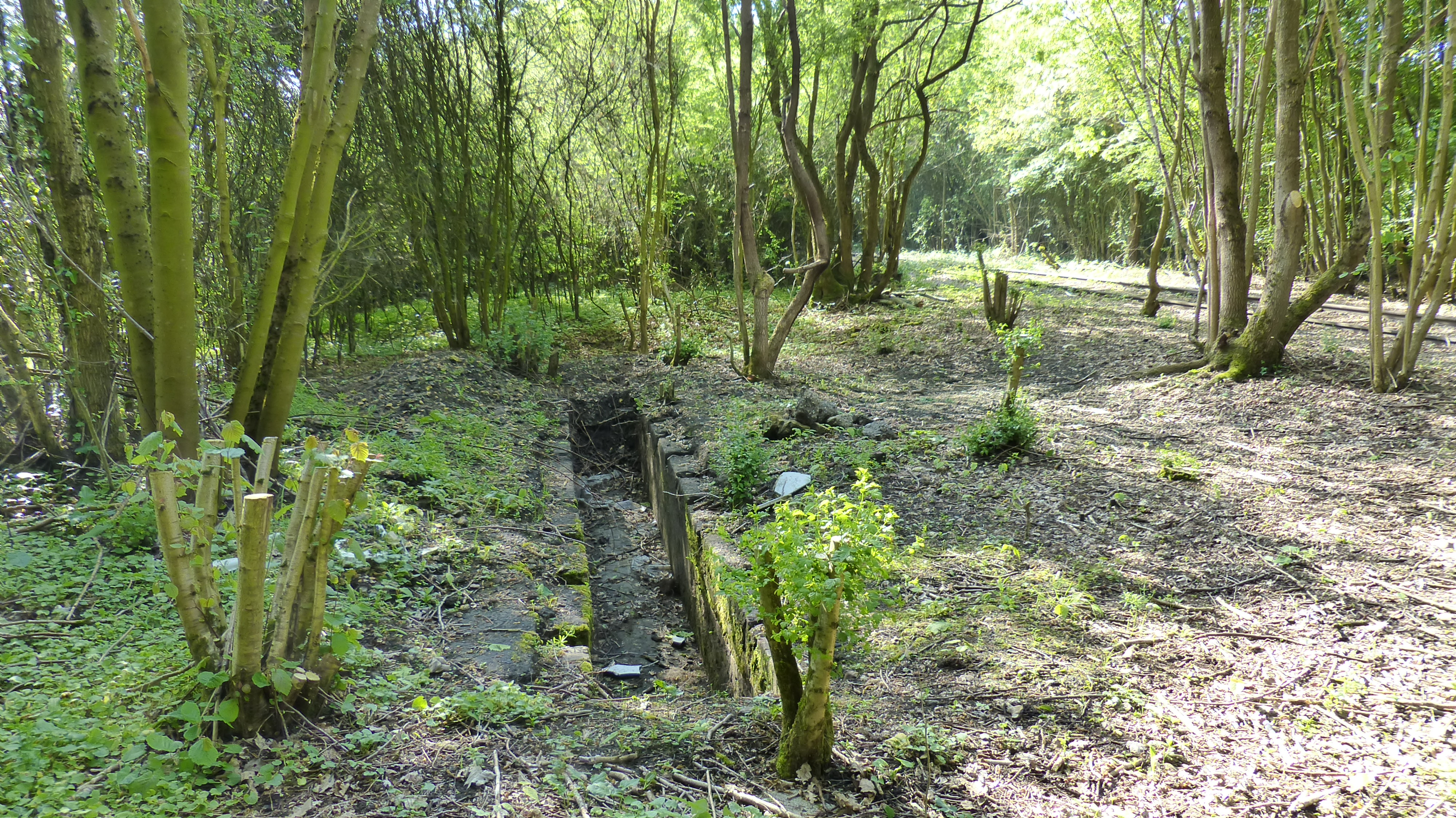 Ancienne fosse de visite de l'EFC en gare de Crèvecoeur, découverte par les bénévoles du MTVS lors du défrichement de la zone